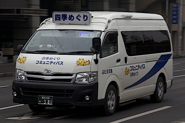 四季めぐり号(横浜市旭区コミュニティバス)